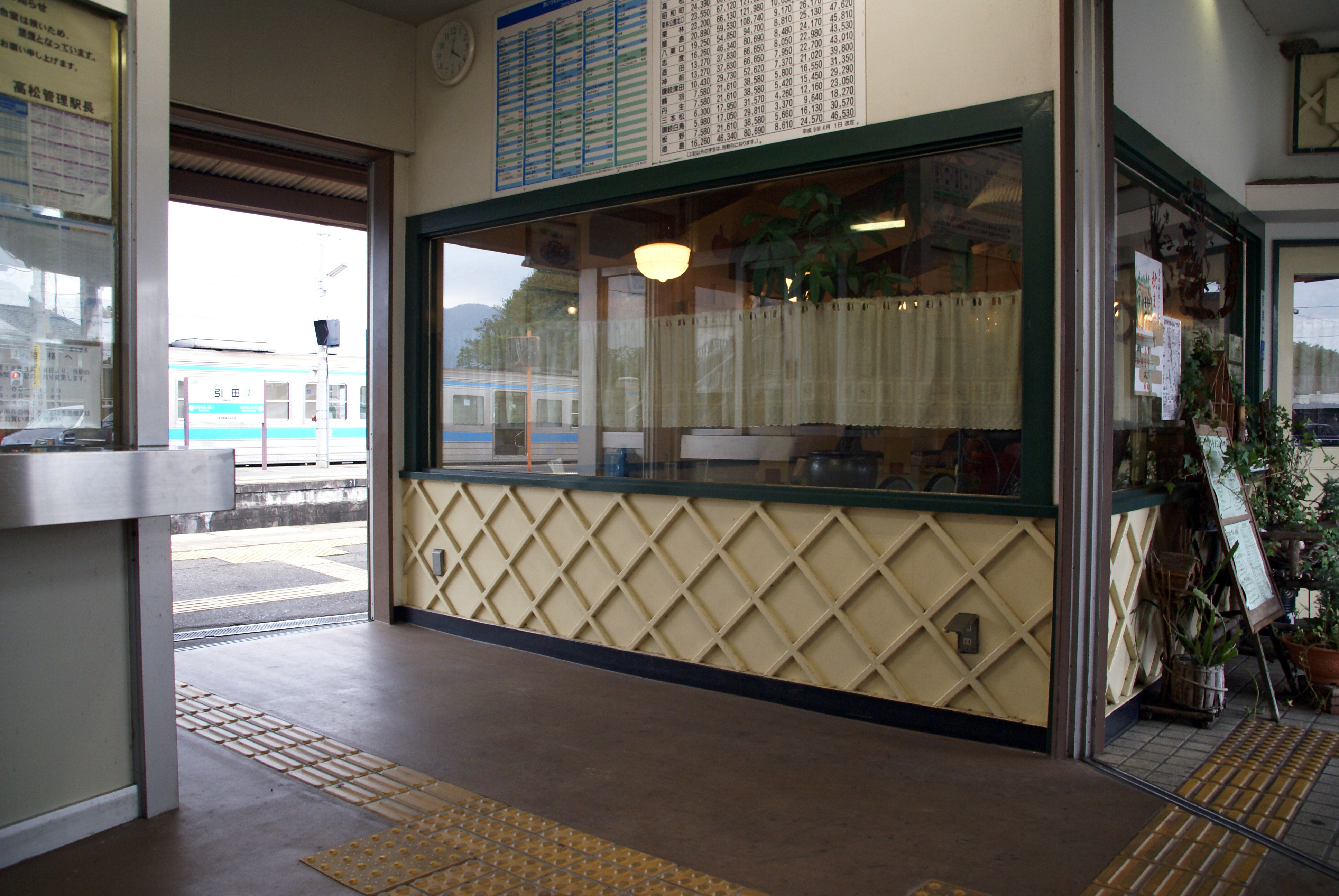 Hiketa Station in Higashikagawa, Kagawa prefecture, Japan